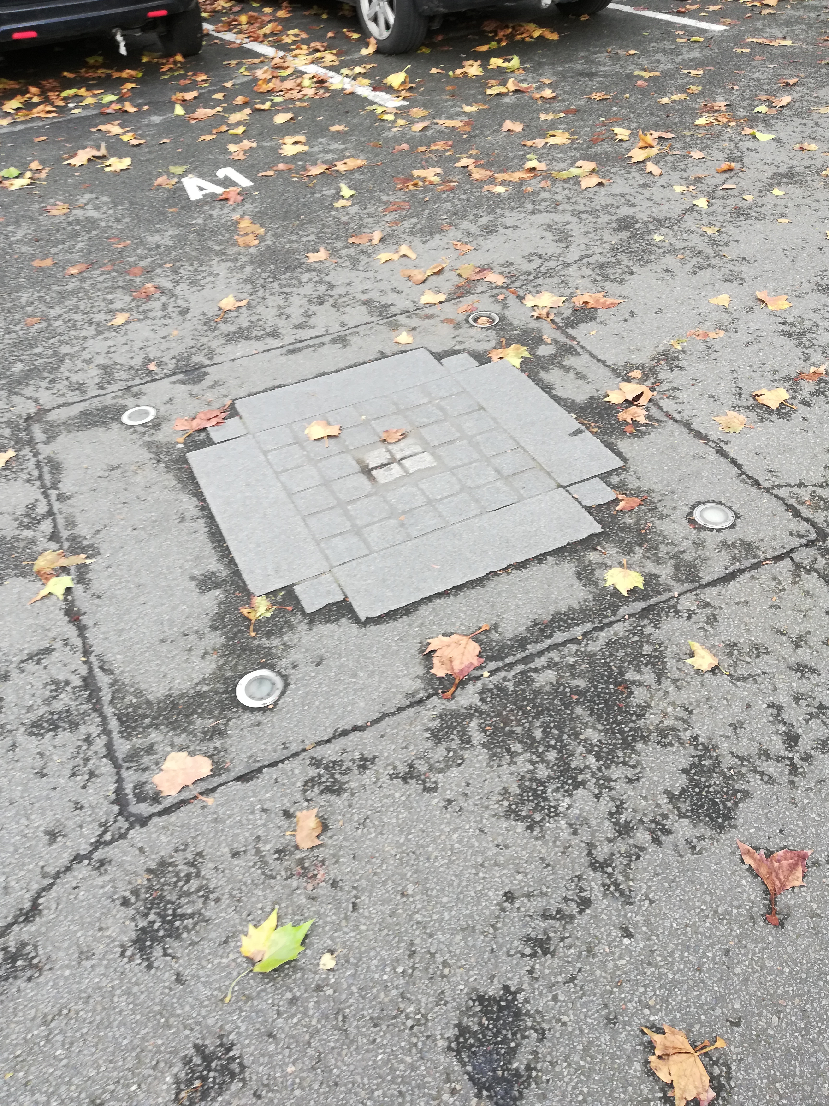 Pavé marquant le lieu exact de l'exécution de Charette sur l'actuel parking de la place Viarme.